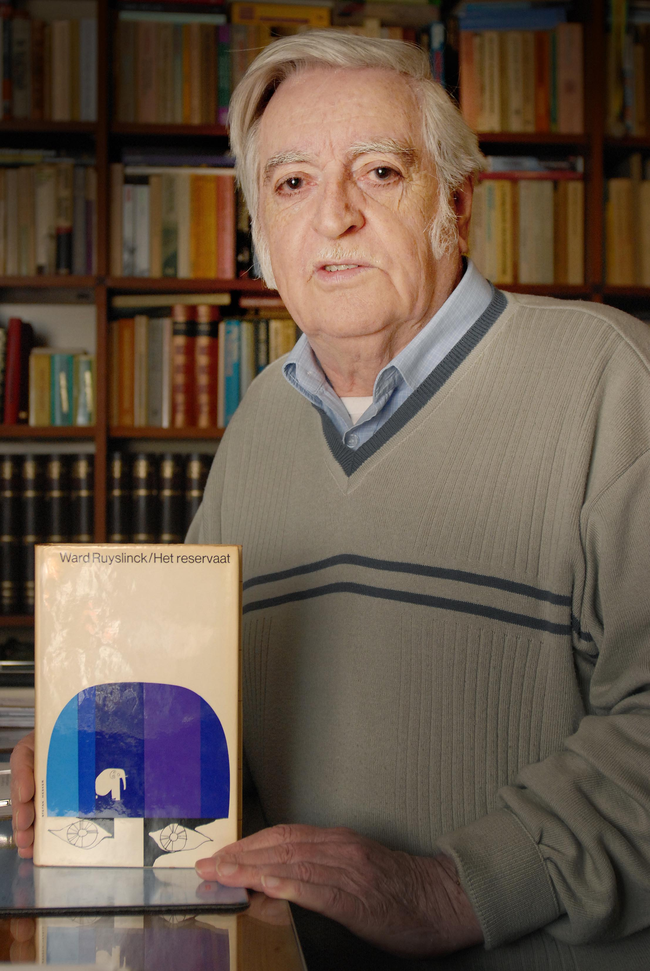 Ward Ruyslinck, Vlaams schrijver met de eerste druk van 'Het reservaat'.